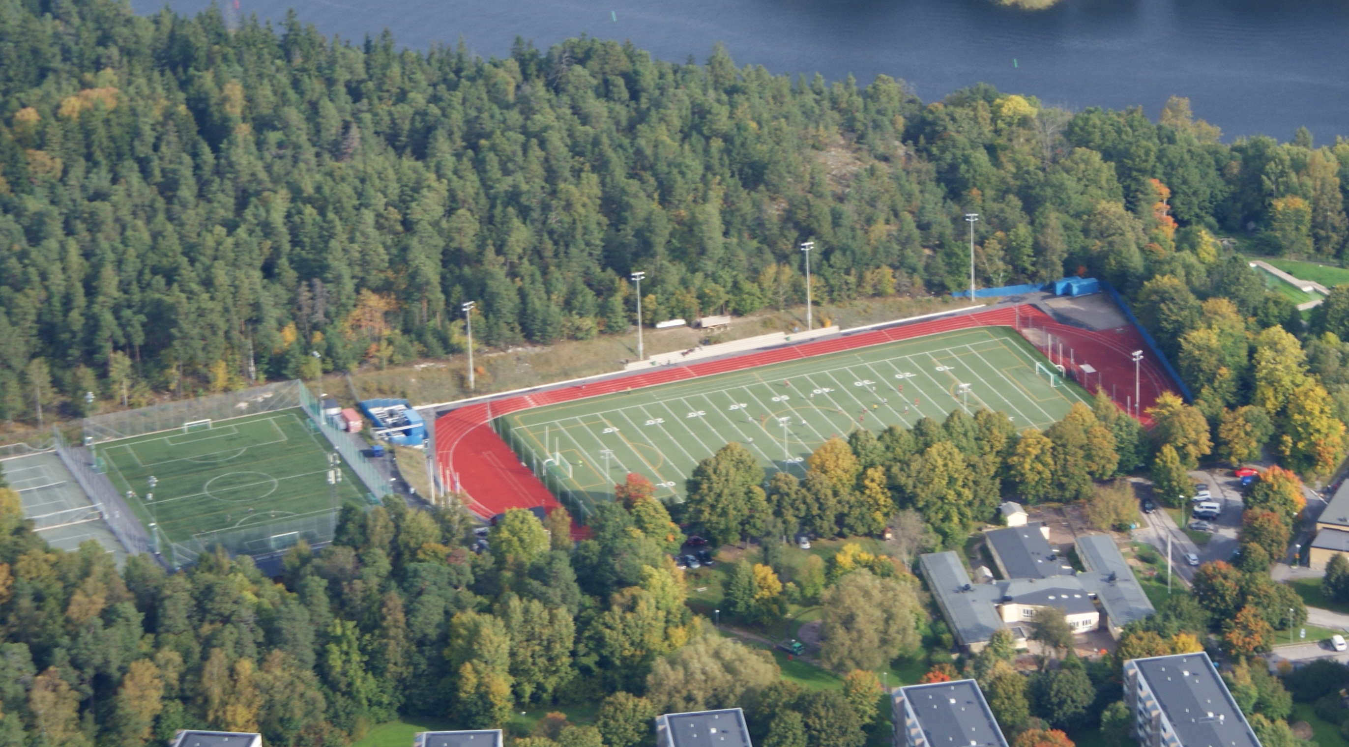 Bergshamra IP sedd från helikopter.